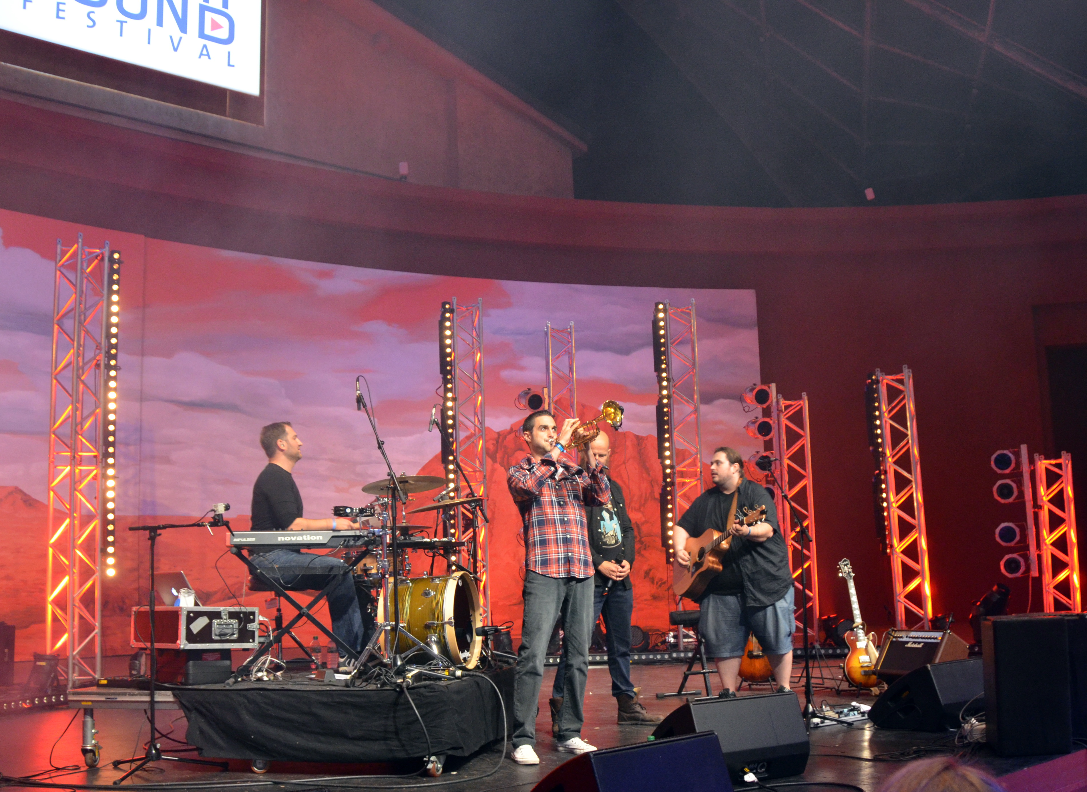 Heimatsound-Festival 2014, Mathias Kellner mit Gästen: Andreas Schechinger (Schlagzeug), Dominik Glöbl (Trompete) und Sebastian Horn (Gesang) Festivalsommer This photo was created with the support of donations to Wikimedia Deutschland in the context of the CPB project "Festival Summer". This file is made available under the Creative Commons CC0 1.0 Universal Public Domain Dedication. The person who associated a work with this deed has dedicated the work to the public domain by waiving all of their rights to the work worldwide under copyright law, including all related and neighboring rights, to the extent allowed by law. You can copy, modify, distribute and perform the work, even for commercial purposes, all without asking permission. Personality rights warningAlthough this work is freely licensed or in the public domain, the person(s) shown may have rights that legally restrict certain re-uses unless those depicted consent to such uses. In these cases, a model release or other evidence of consent could protect you from infringement claims.